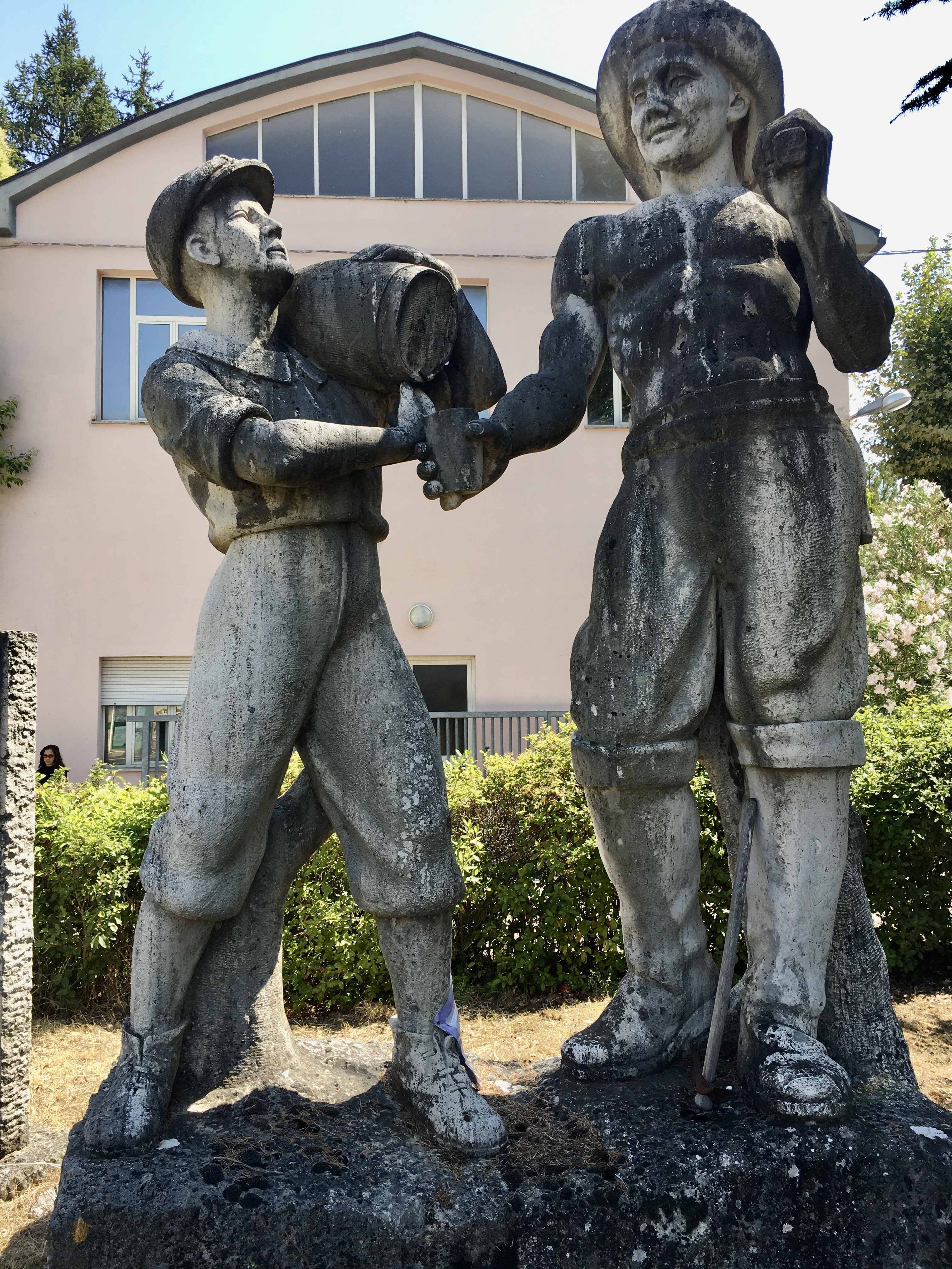 Monumento al minatore, Morgnano (Spoleto), 1945